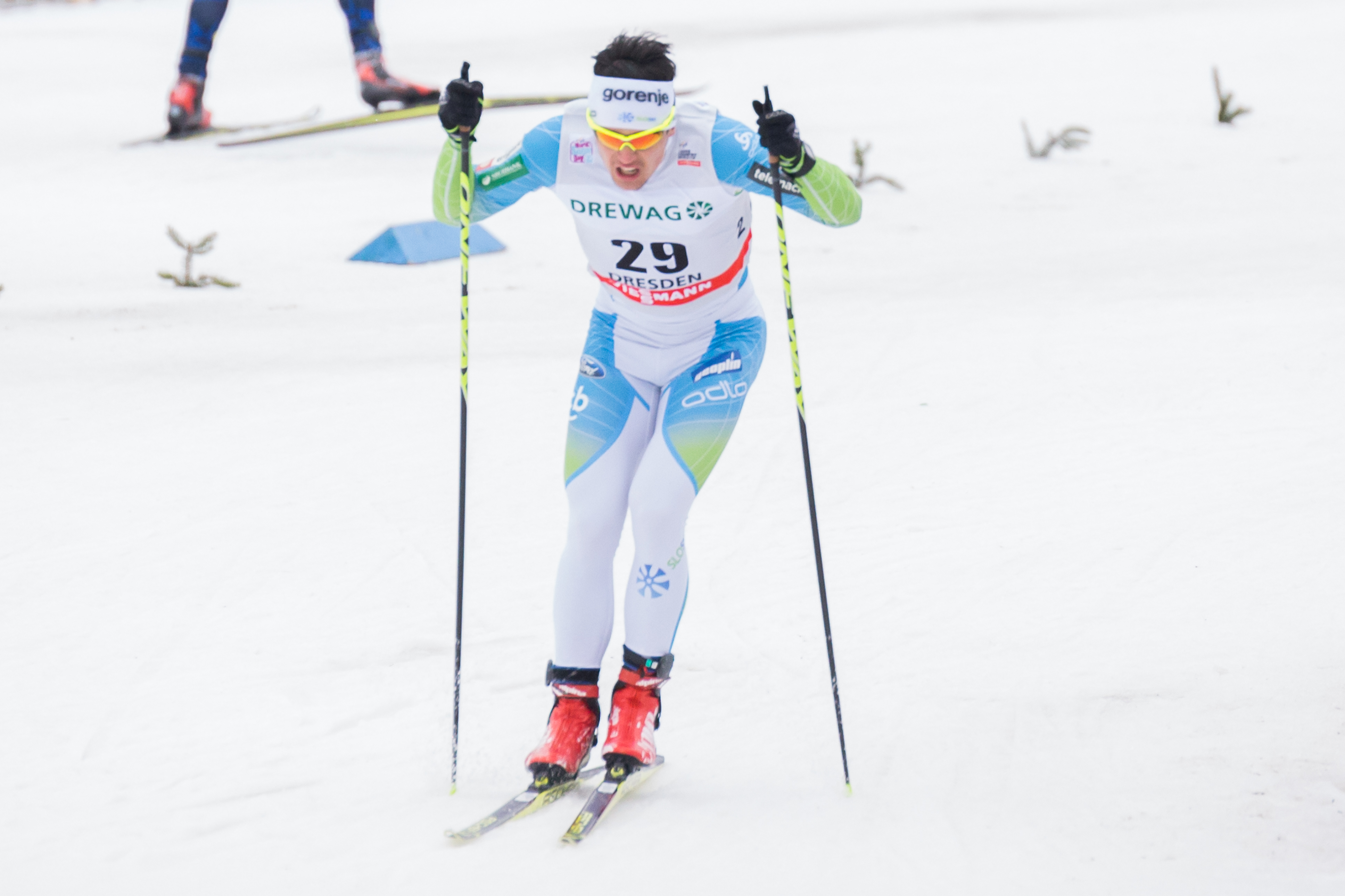 Miha Simenc (SLO, Slowenien)